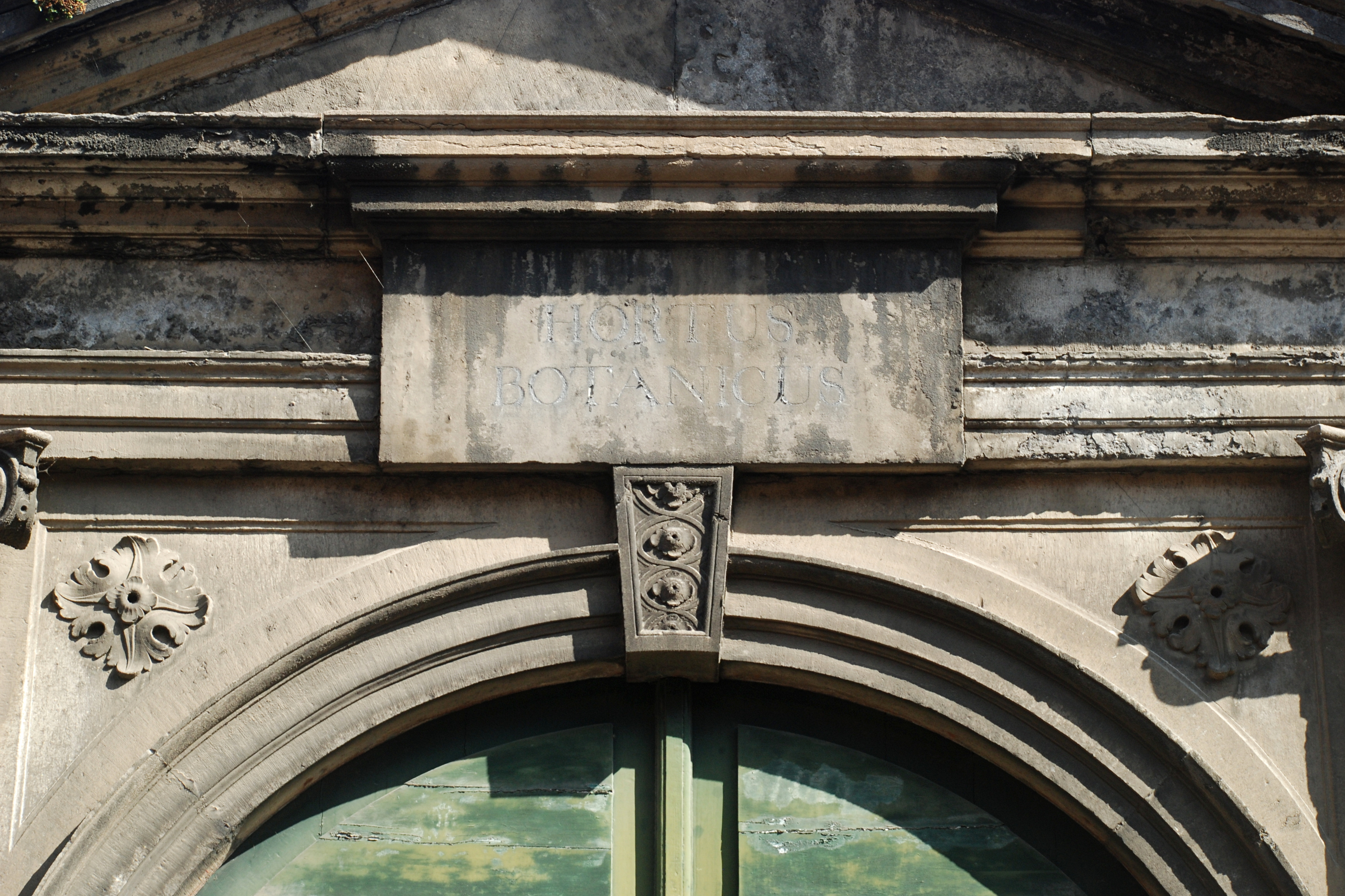 Belgique - Louvain - Jardin botanique (Kruidtuin) - portail néo-classique de l'ancien jardin botanique (architecte Laurent-Benoît Dewez -1771)